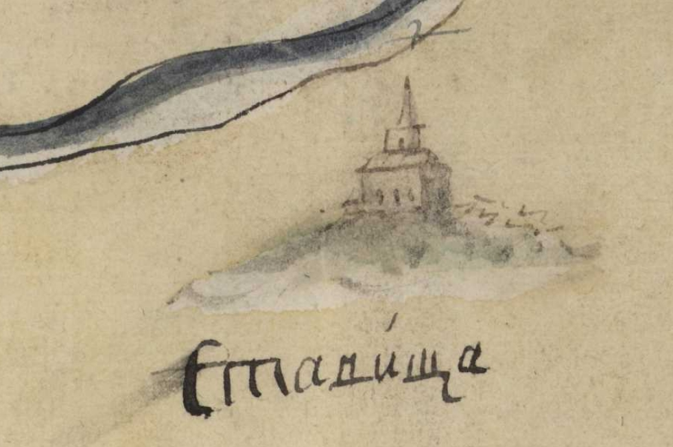 Фрагмент карти Київської губернії. XVIII століття. РГАДА, ф. 192, оп. 1, Киевская губ., № 5.